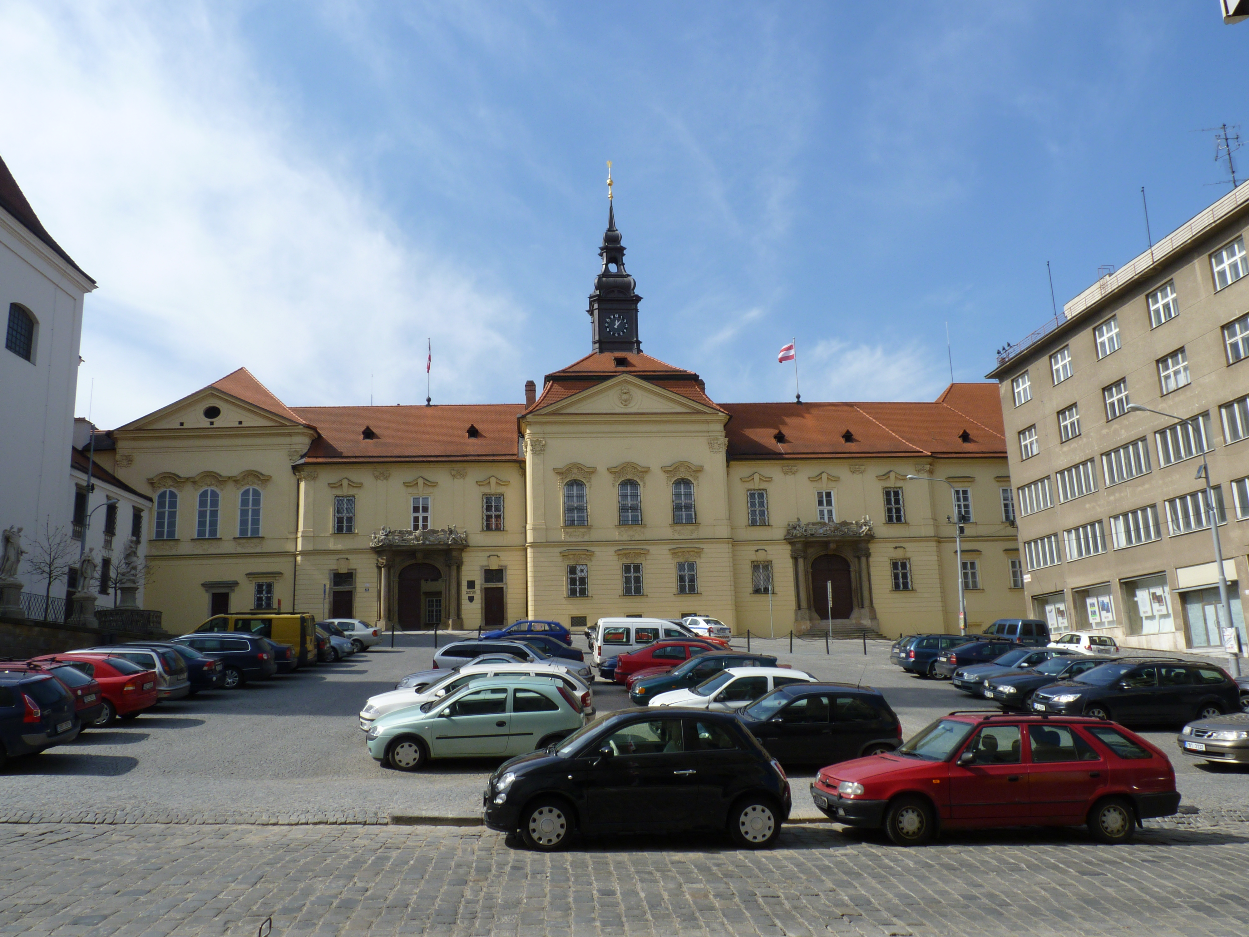 Nová radnice, Brno